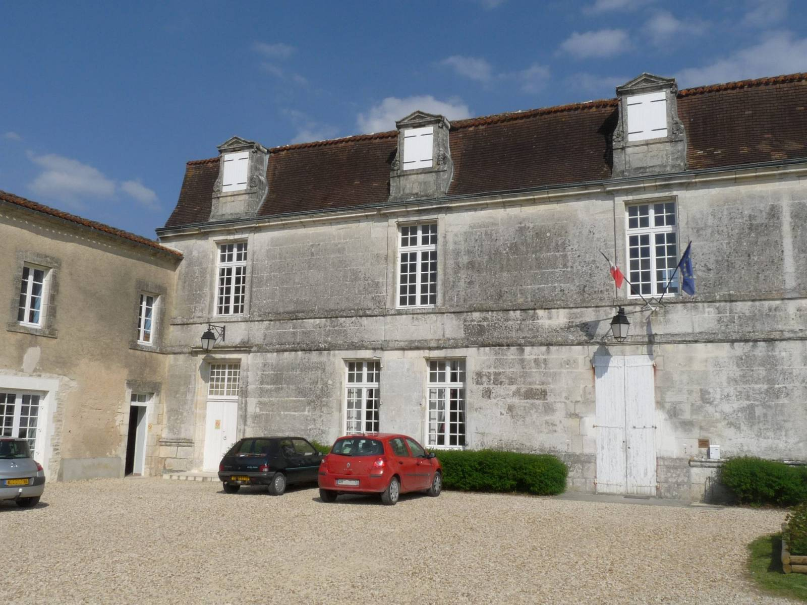 Mairie de Gondeville, Charente, France